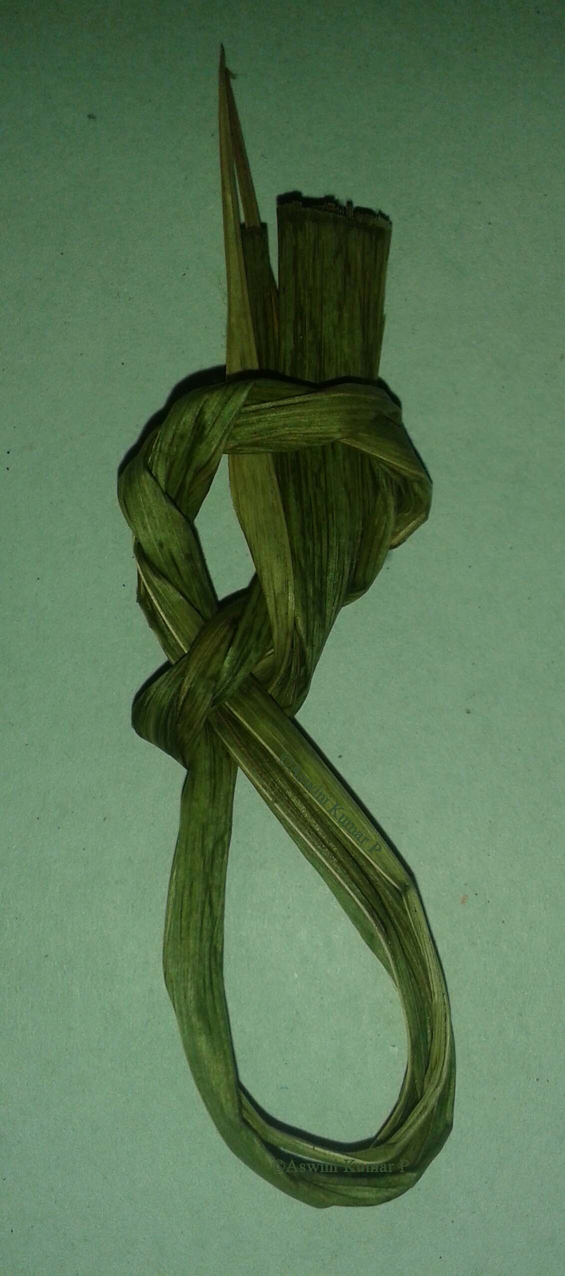 ദർഭപുല്ലുകൊണ്ട് നിർമിക്കുന്ന പവിത്രം